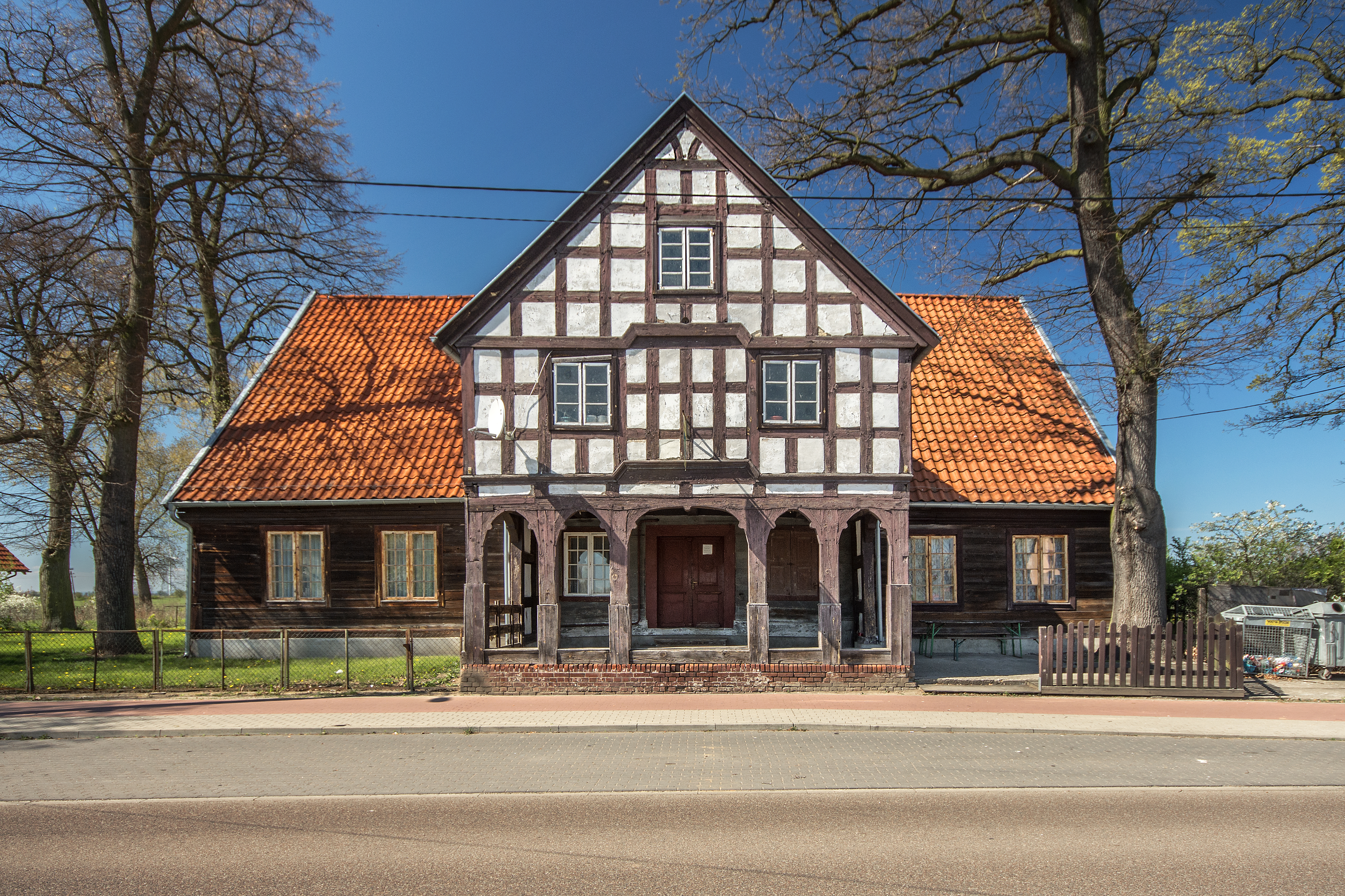 Nowy Staw, dom podcieniowy, 1820